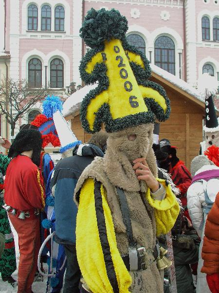 Dziady żywieckie – Jukace – Jukoce – zwyczaj ludowy odprawiany na Żywiecczyźnie. Zdjęcie Jurbox